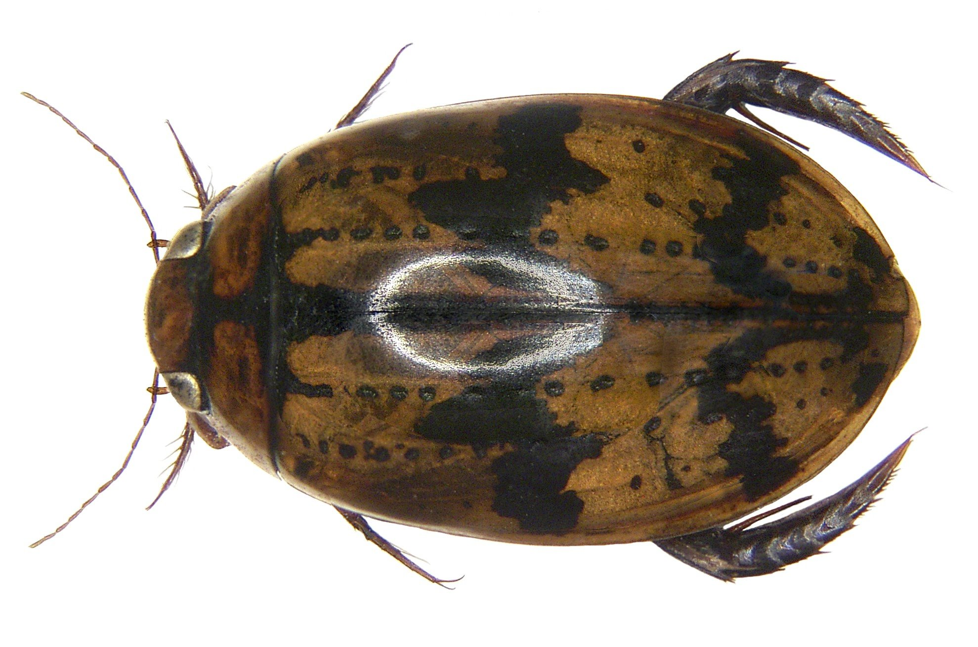 Sandracottus mixtus (Blanchard, 1853) Familie: Dytiscidae Grösse: 14,5 mm Fundort: Nord-China; Sechuan leg. E.Kucera, 2002; det. A.Skale Foto: U.Schmidt, 2007